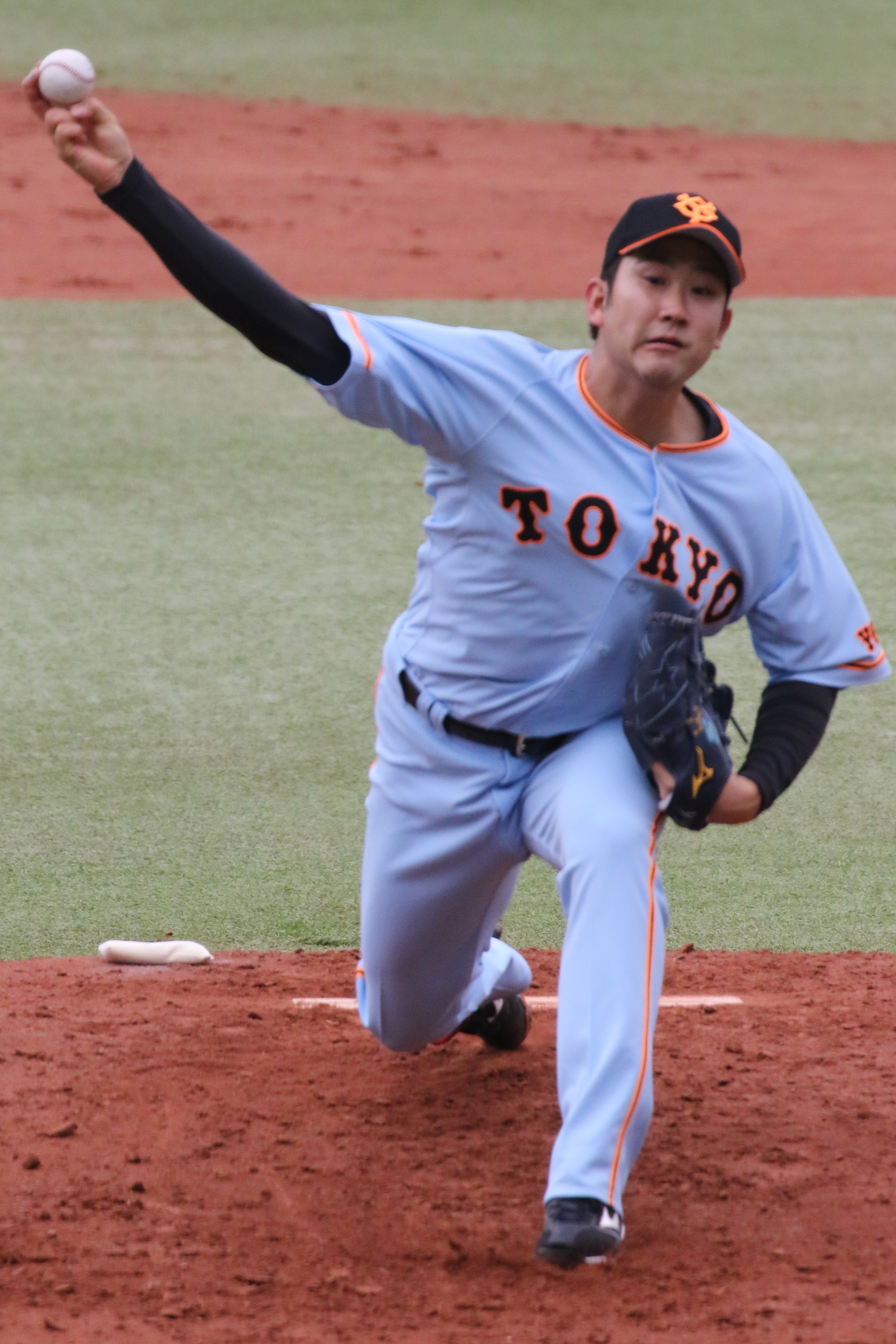 ジャイアンツ菅野選手